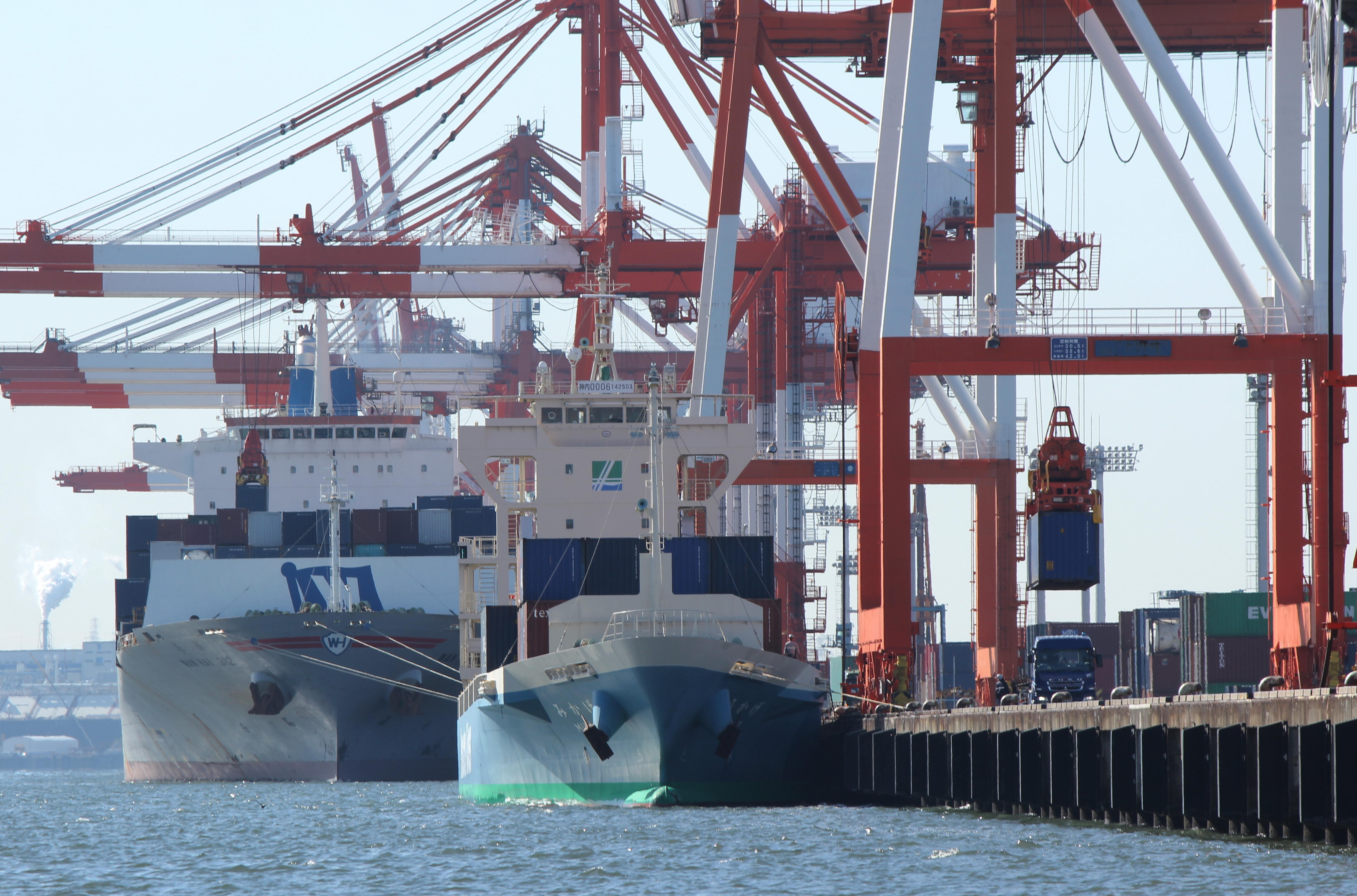 名古屋港 飛島ふ頭に接岸中のコンテナ船